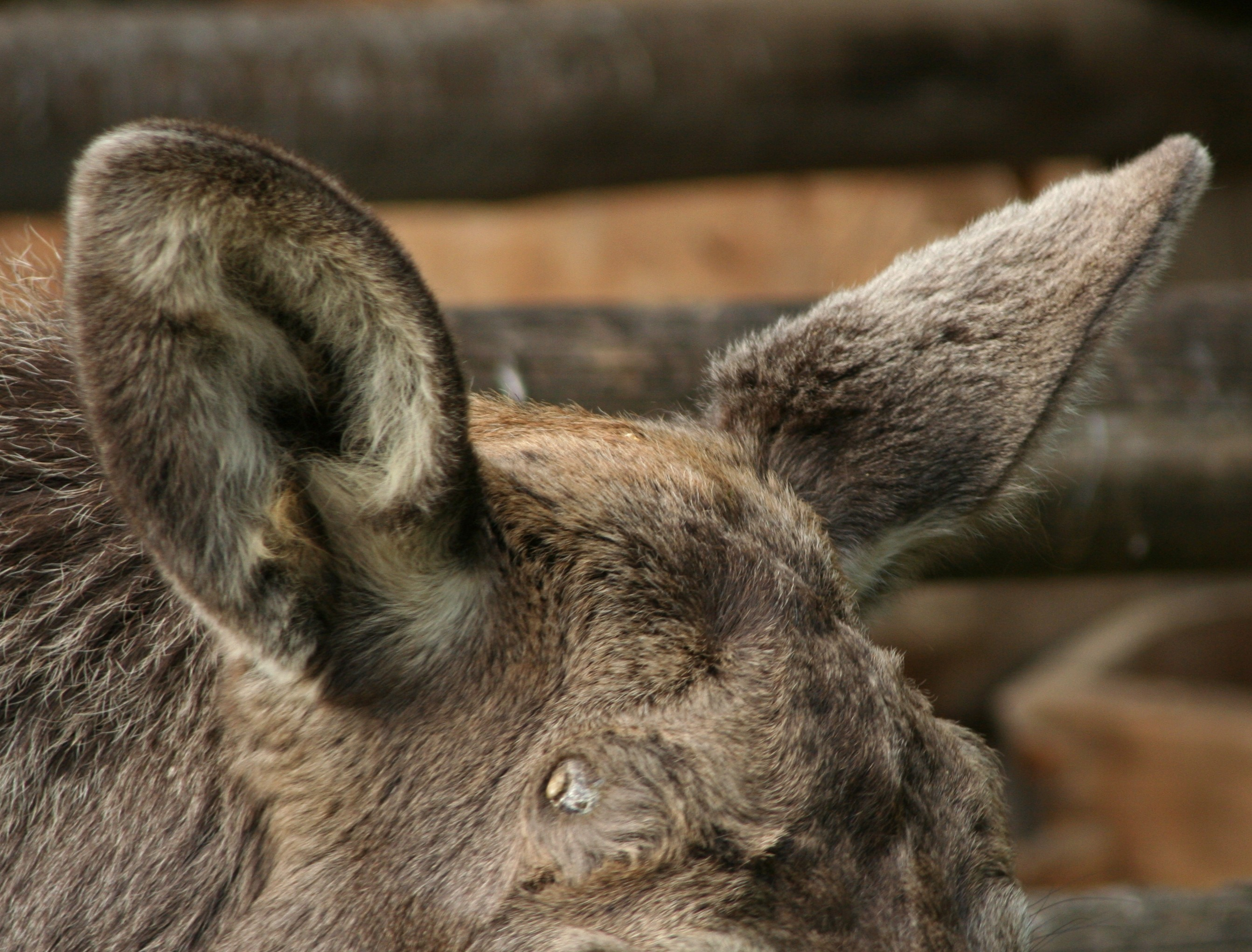 Alces_alces